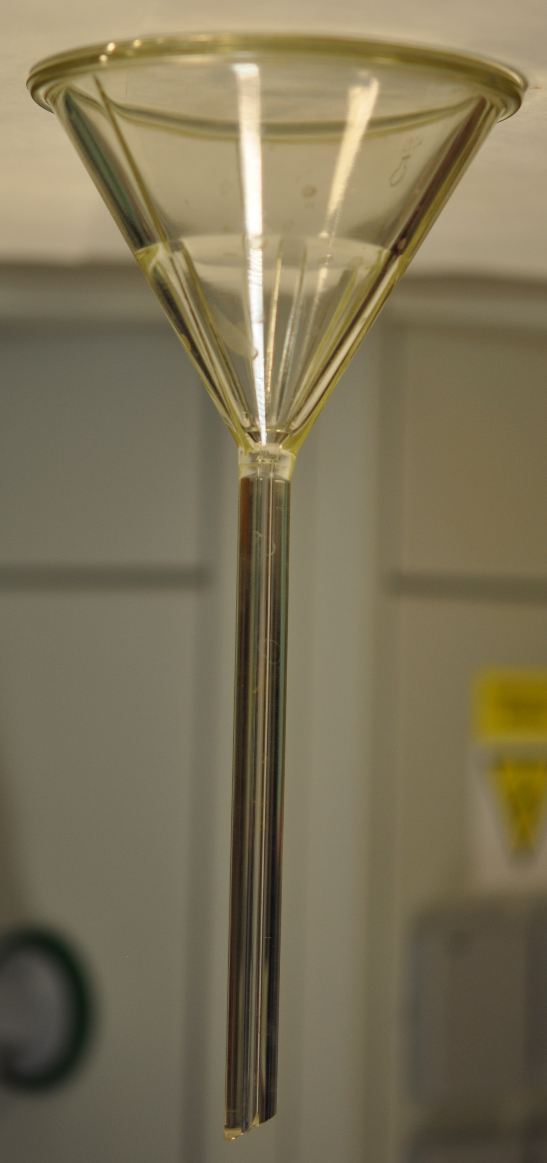 Rychlofiltrační nálevka